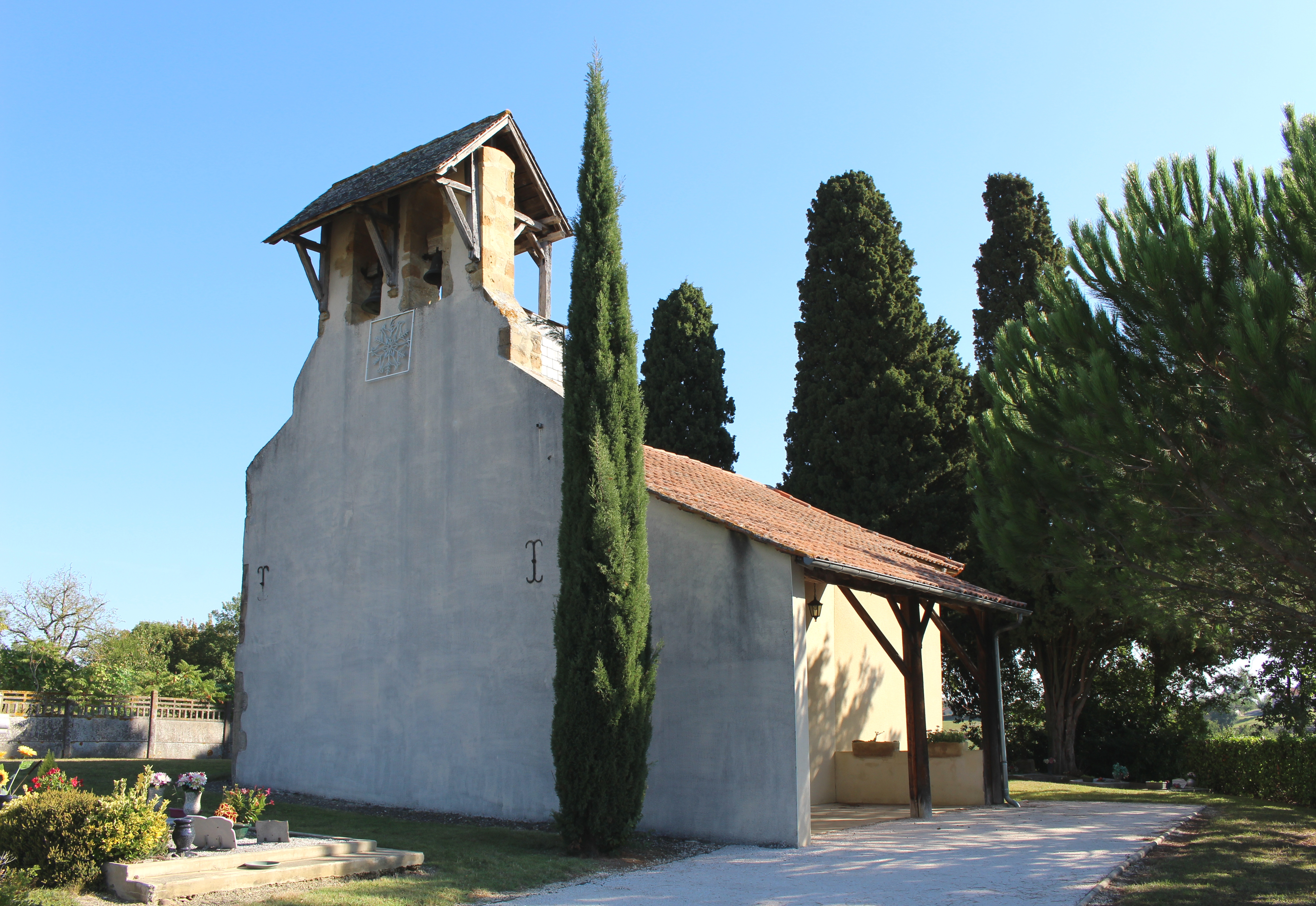 Église Saint-Jean-l'Evangéliste de Mingot (Hautes-Pyrénées)